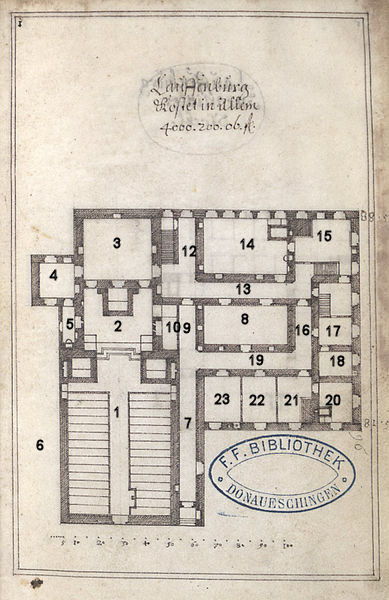 Lageplan des Erdgeschosses des Kapuzinerklosters Laufenburg nach der "Architectura Capuzinorum".